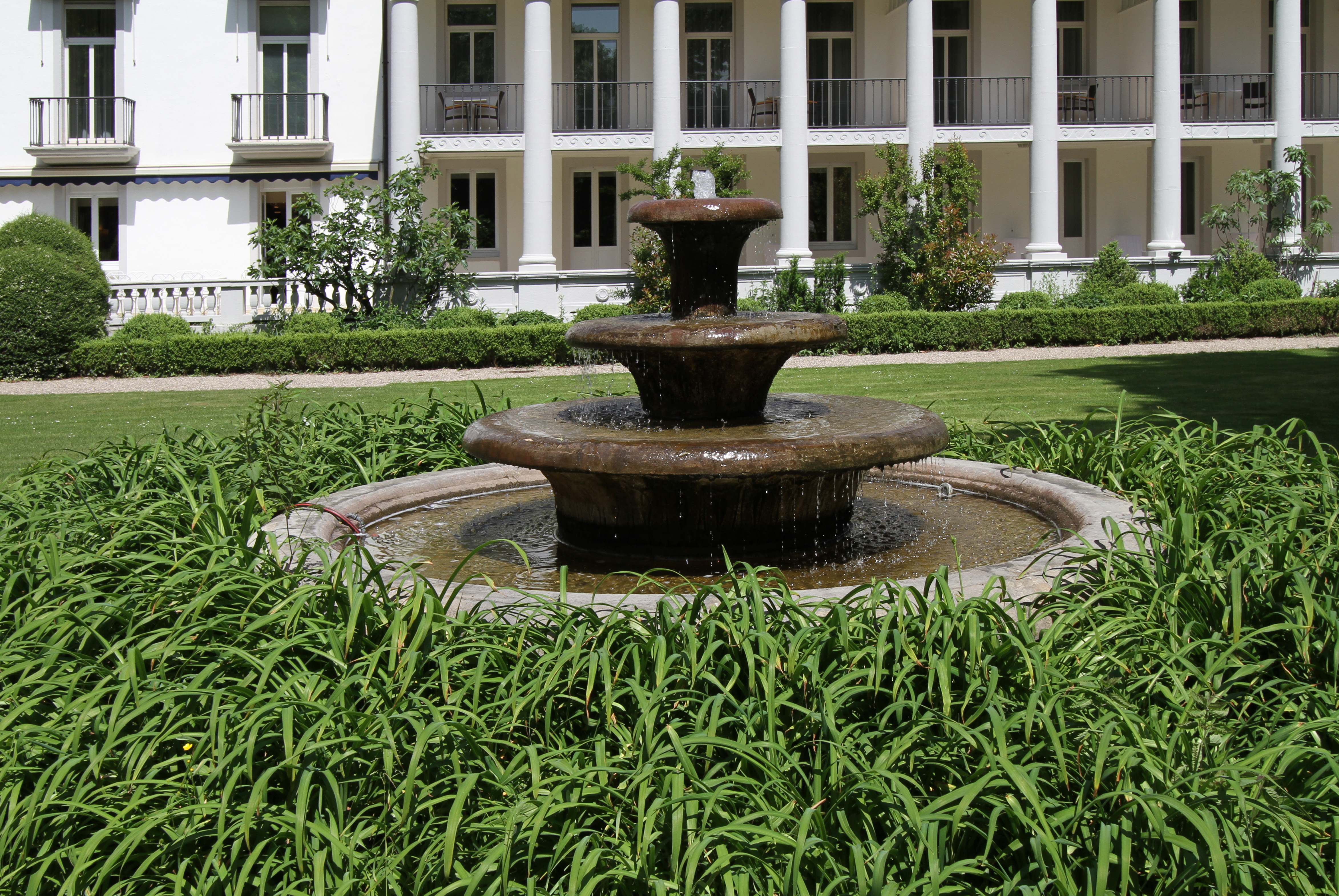 Hotel Badischer Hof in Baden-Baden